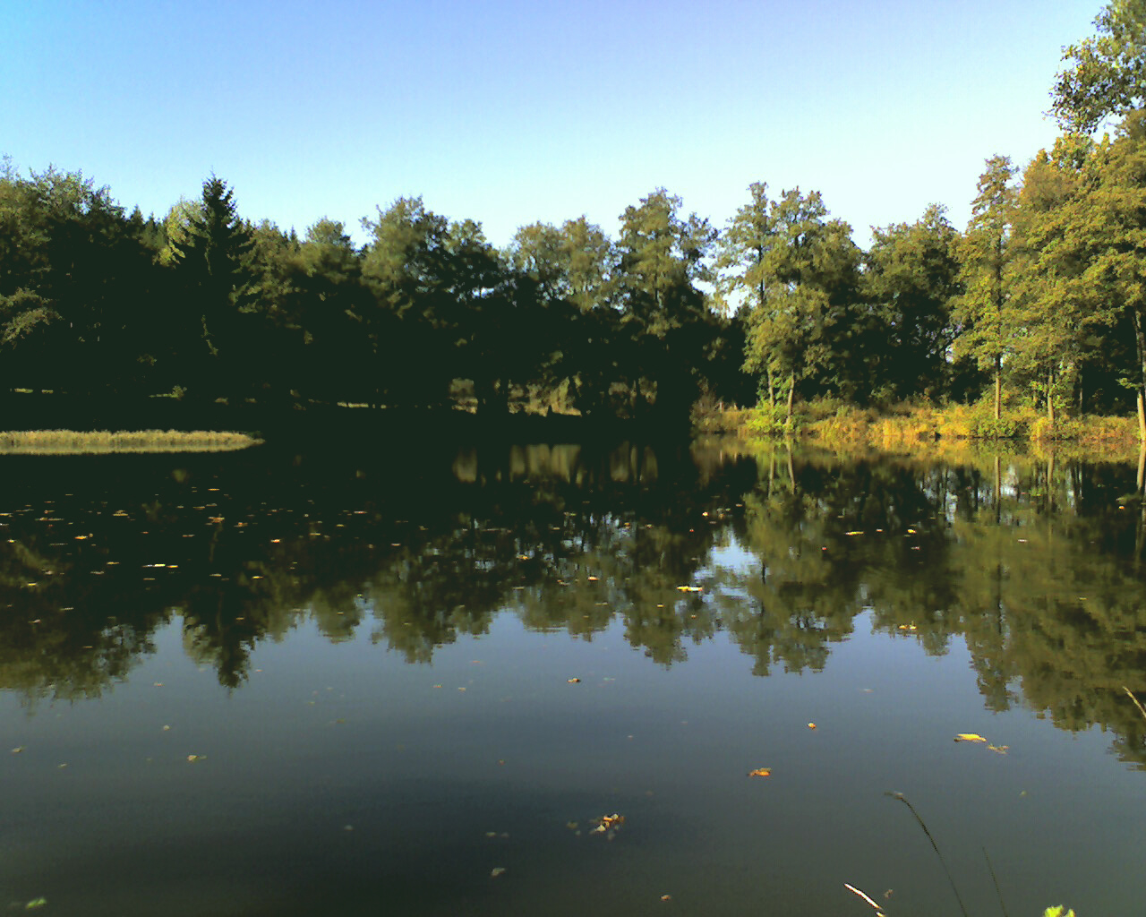 Blick vom Ostufer auf den Damm und Teile des Westufers